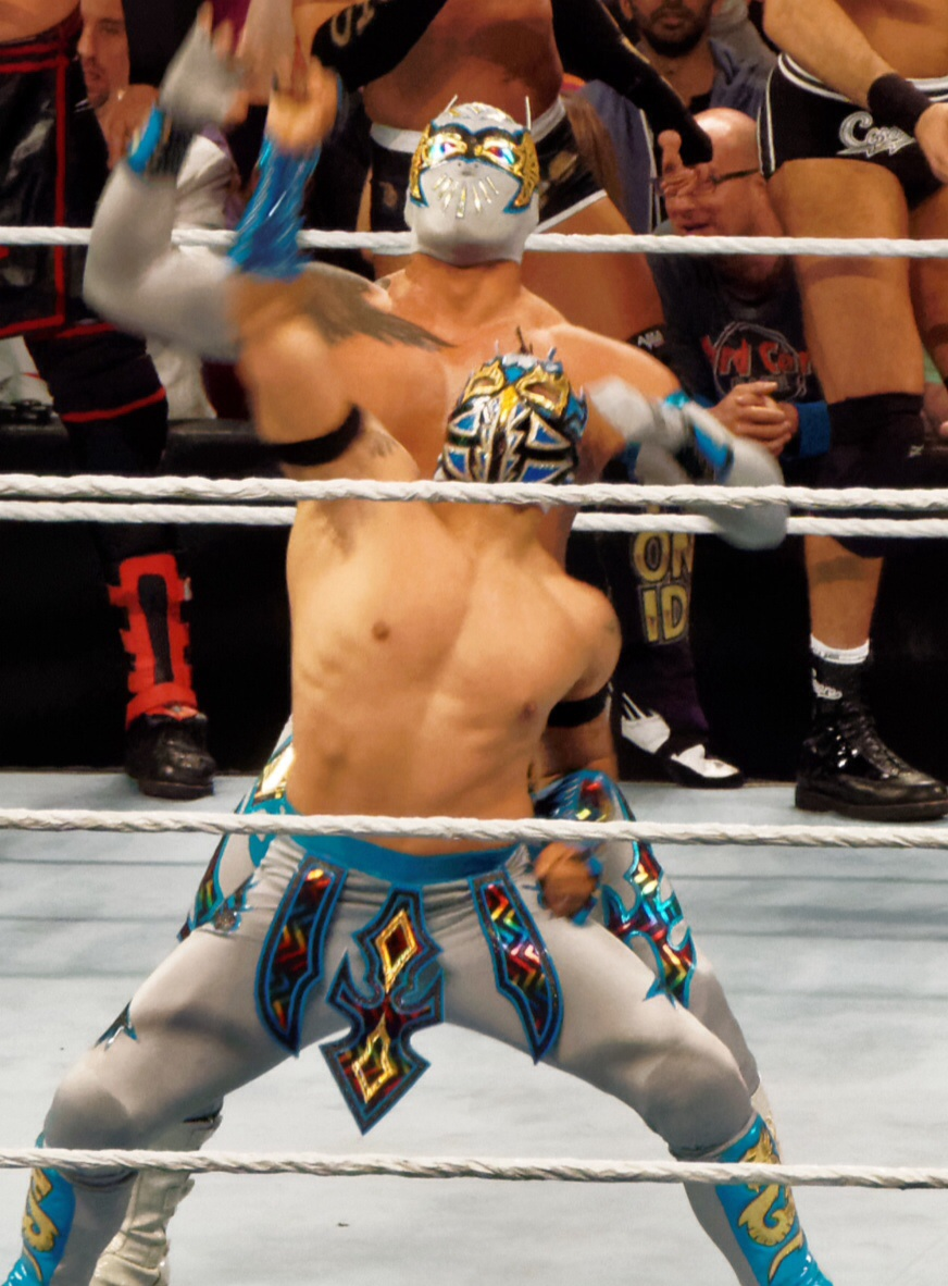 2015-03-30_17-44-27_ILCE-6000_0996_DxO